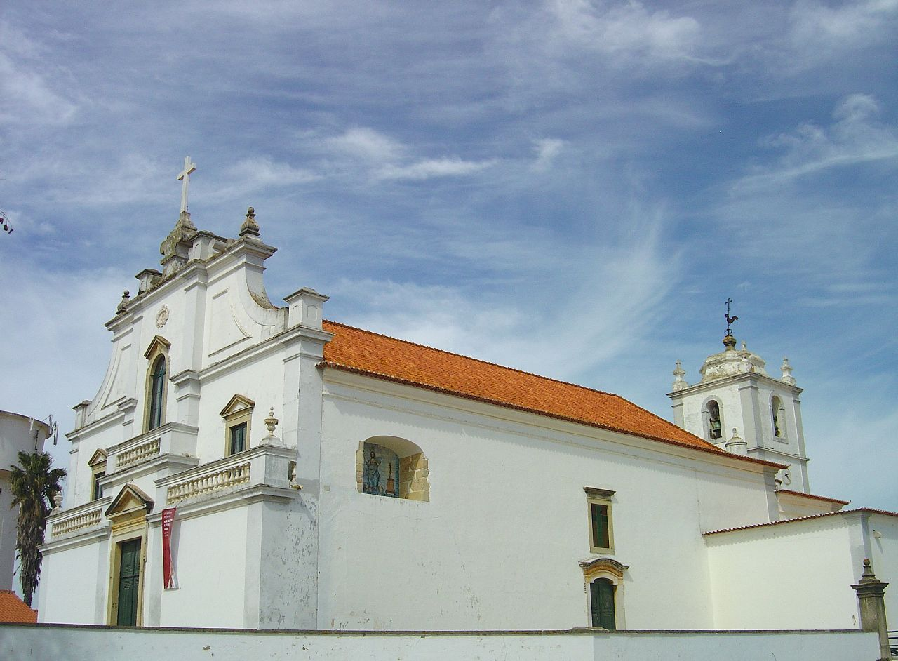 A Igreja Matriz de Lagoa situa-se no coração da vila, a partir do qual esta parece nascer. Do século XVIII, tem elementos exteriores da época barroca. No seu interior, repartem-se três naves, destacando-se a imagem da Nossa Senhora da Luz (padroeira da igreja), no altar-mor, e relicários dos séculos XVII e XVIII nos restantes altares. See where this picture was taken. [?]